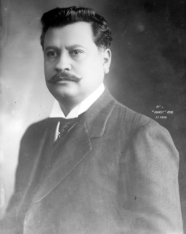 Retrato de Jesús Flores Magón